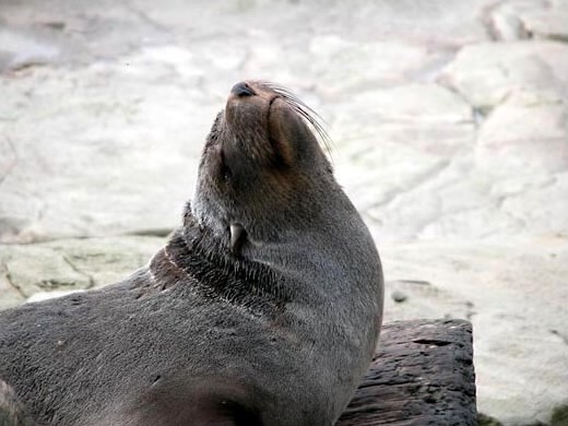 Südafrikanische Seebär (Arctocephalus pusillus)